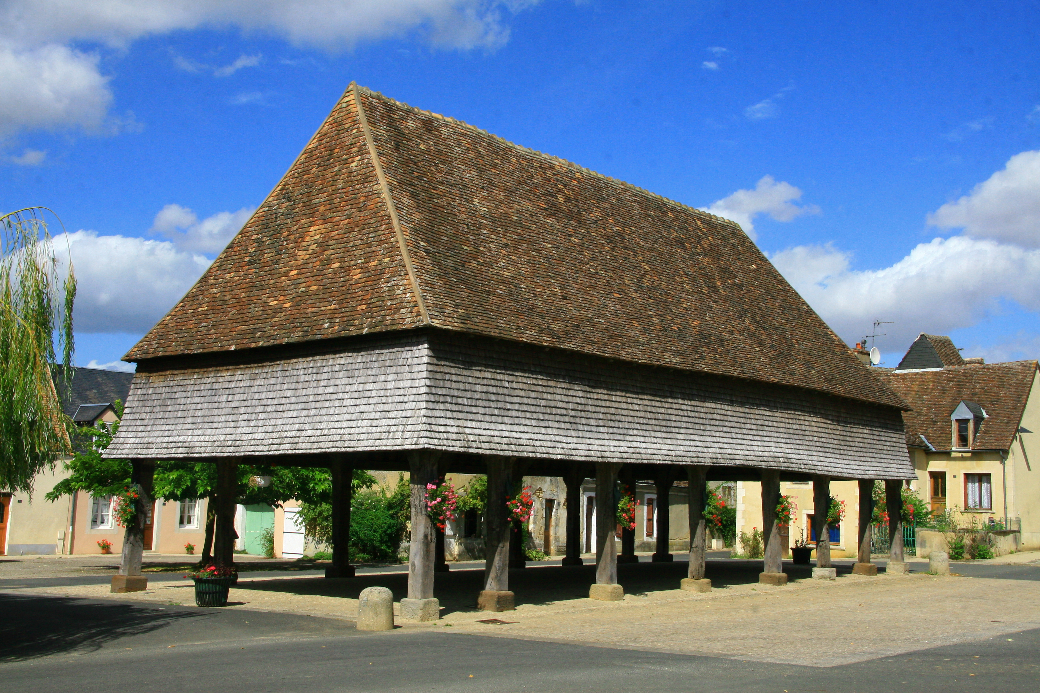 Halles au centre de René, Sarthe, Pays de la Loire, France